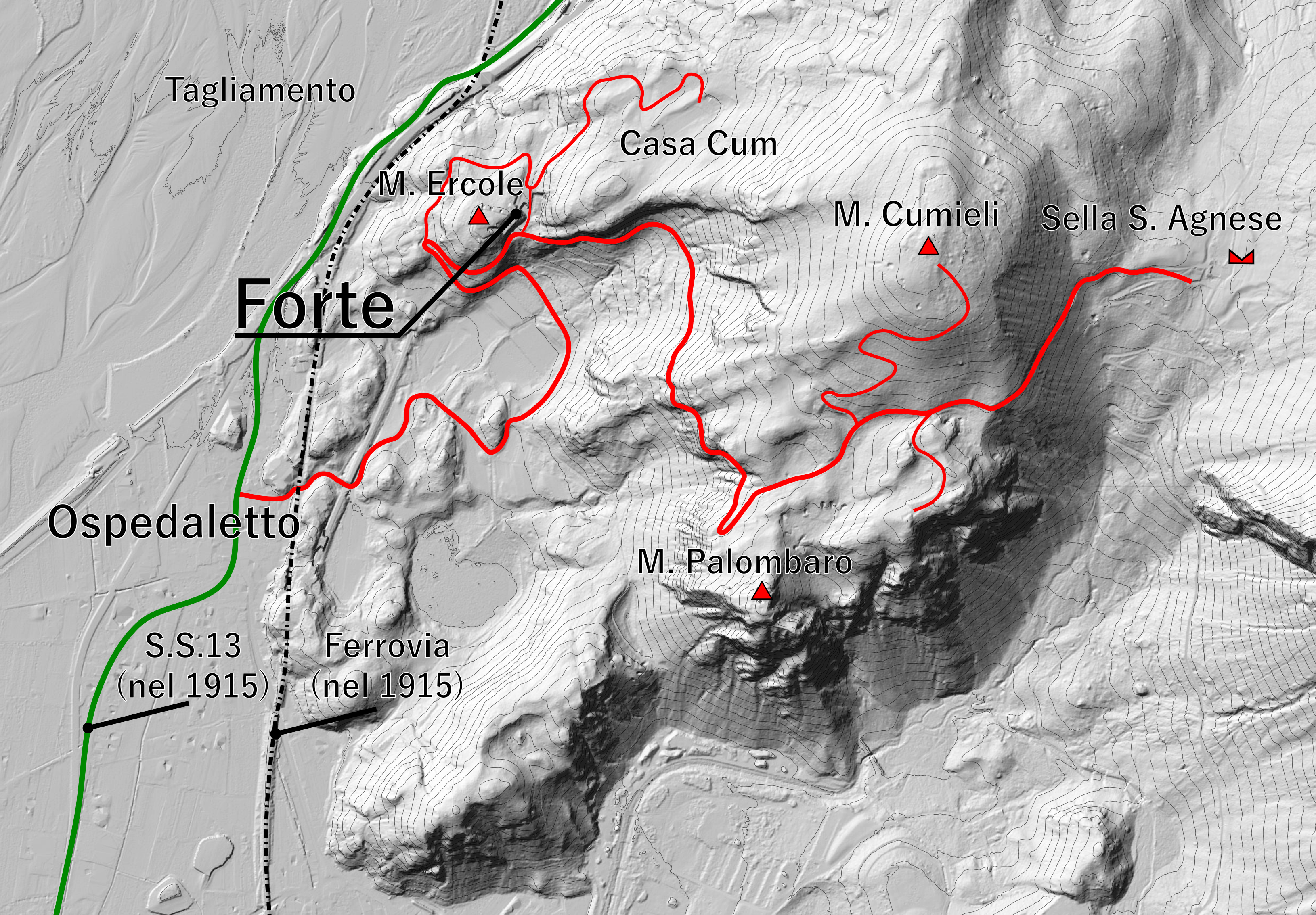 Complesso delle opere di forte di Monte Ercole (Ospedaletto di Gemona del Friuli - regione Friuli-Venezia Giulia)